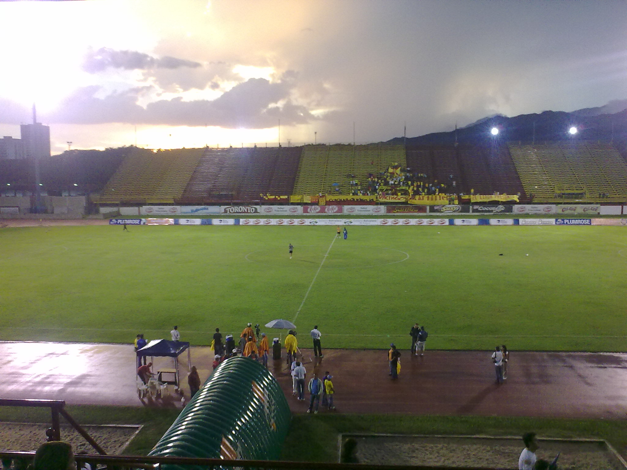 Estadio Hermanos Ghersi con lluvia.